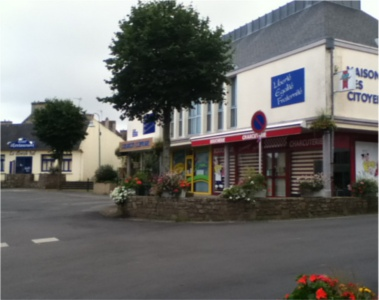 Maison des Citoyens de Locmaria-Plouzané et la boucherie.